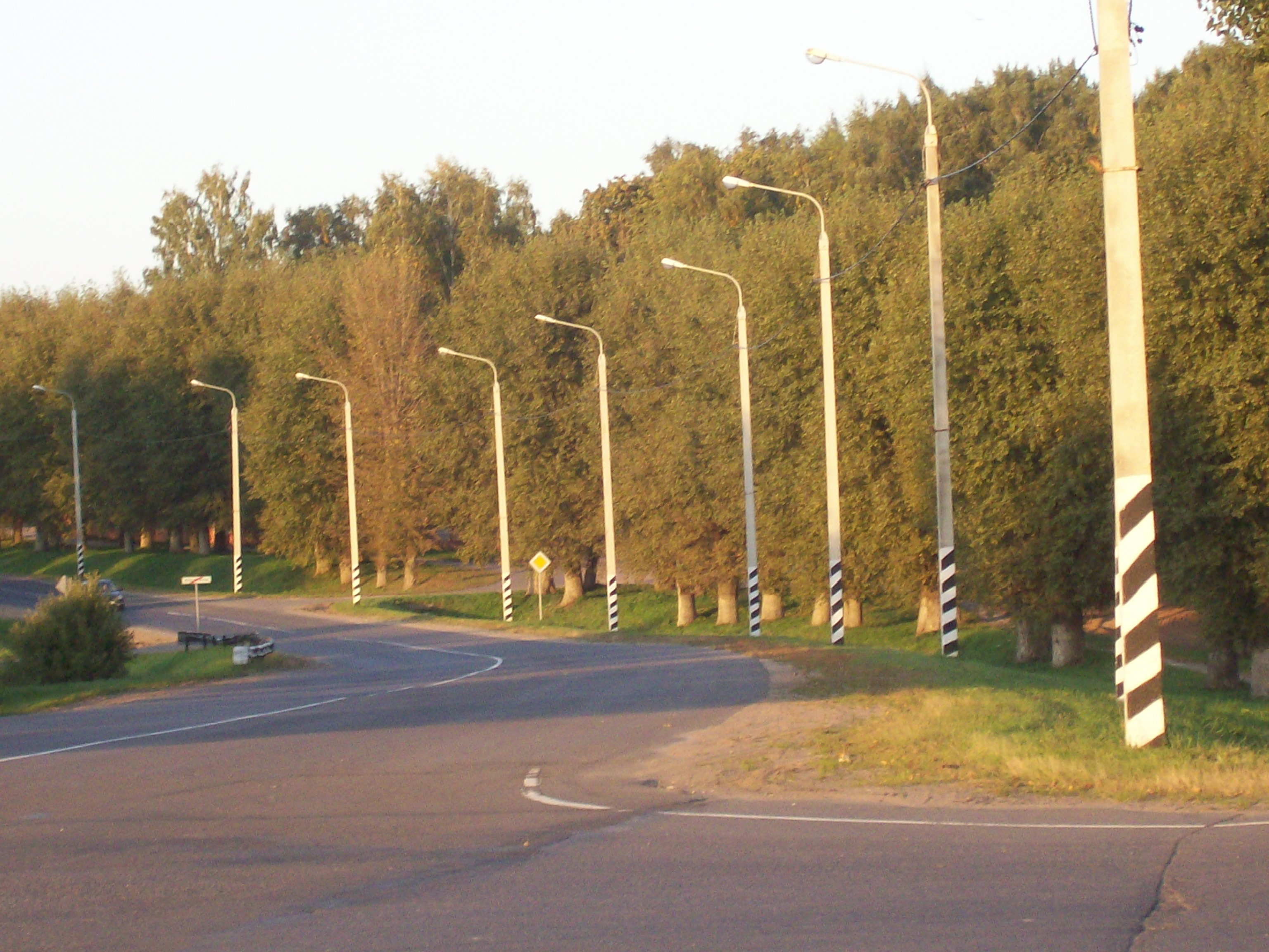 Въезд в пос. Юбилейный, входящий в агрогородок "Сеница" (be:Аграгарадок Сеніца)